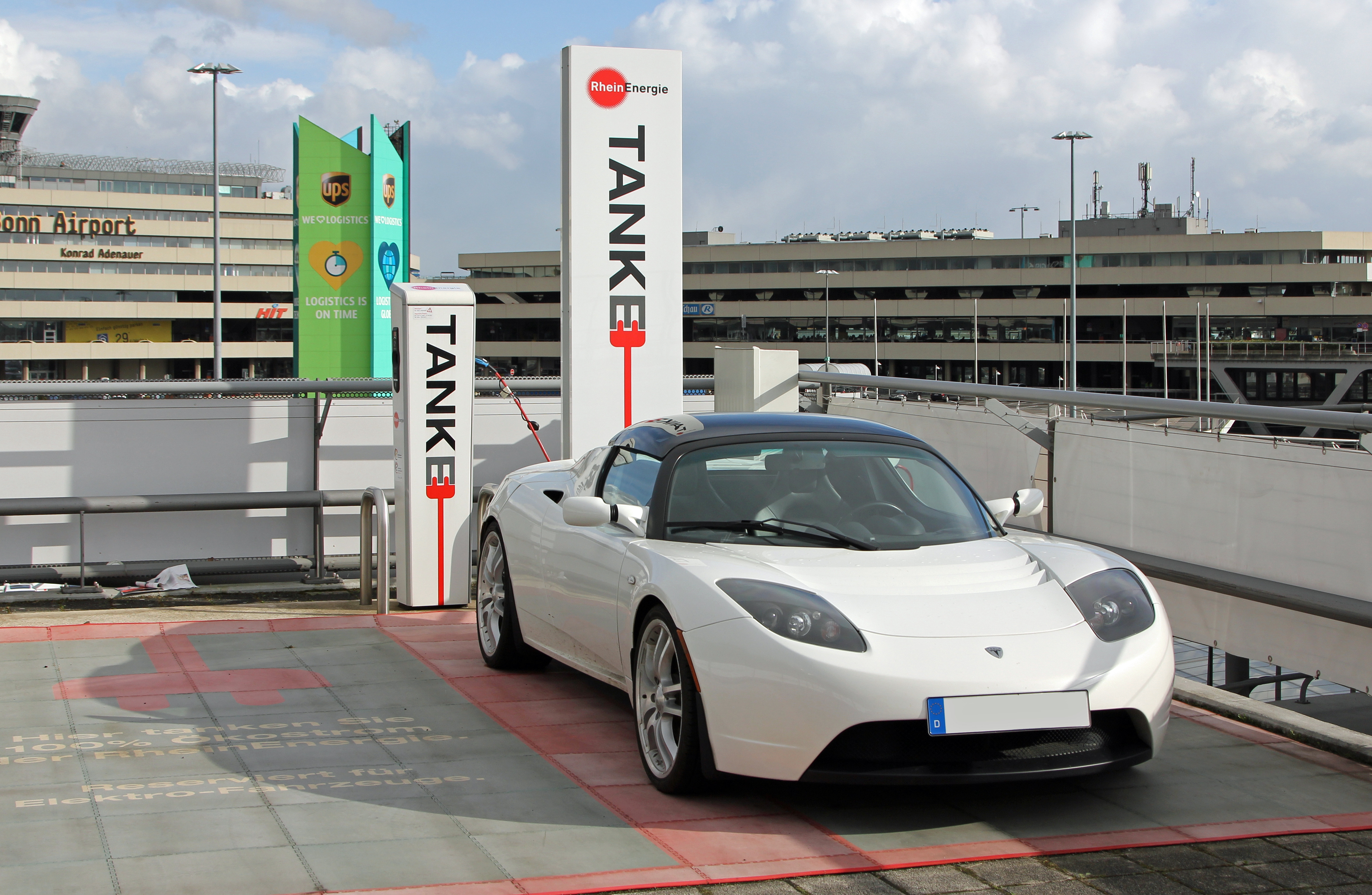 Tesla Roadster an eomer Stromtankstelle der Rheinenergie auf dem Flughafen Köln/Bonn